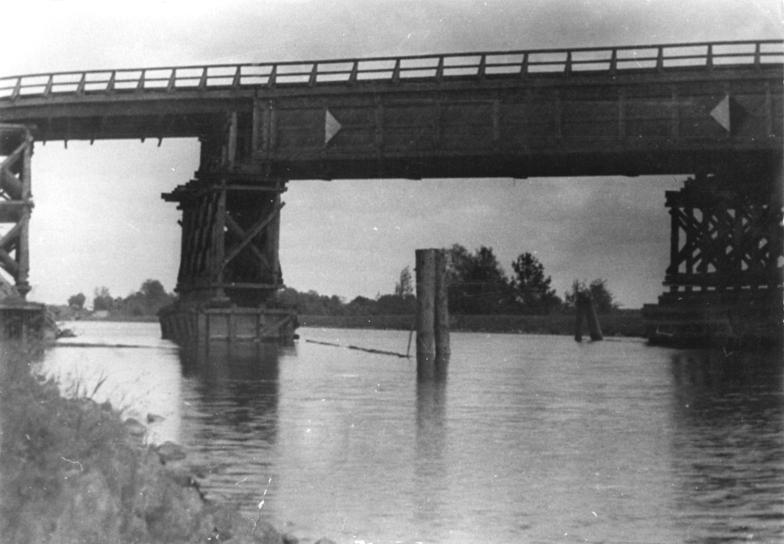 Brandenburg, Autobahnbrücke bei Finowfurt Zentralbild Junge 8.8.1952 Prozeß gegen Tillich-Agenten. Das Oberste Gericht der DDR verhandelte am 8.8.1952 gegen vier Agenten der vom amerikanischen Geheimdienst geleiteten Mord- und Terrororganisation der sogenannten "Kampfgruppe gegen Unmenschlichkeit" die Sabotageakte, Mord- und Terroranschläge geplant hatten. UBz: Die Autobahnbrücke bei Finowfurt, die von den Angeklagten in Brand gesetzt wurde.